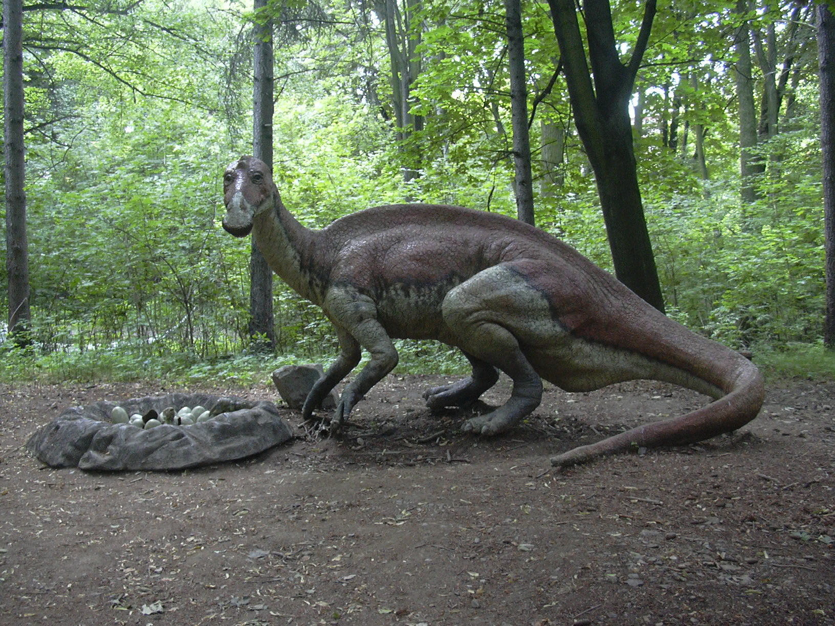 prehist. 01(dinopark vyškov cz.)